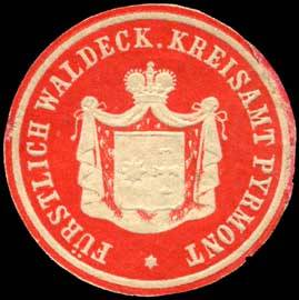 Sealing stamp Title: Fürstlich Waldecker Kreisamt Pyrmont Description: Briefsiegel, rot, weiß, geprägt Place: Pyrmont size: 3 cm